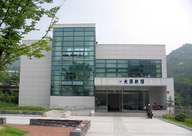 서울대학교 관악캠퍼스 75동. 대학신문사.